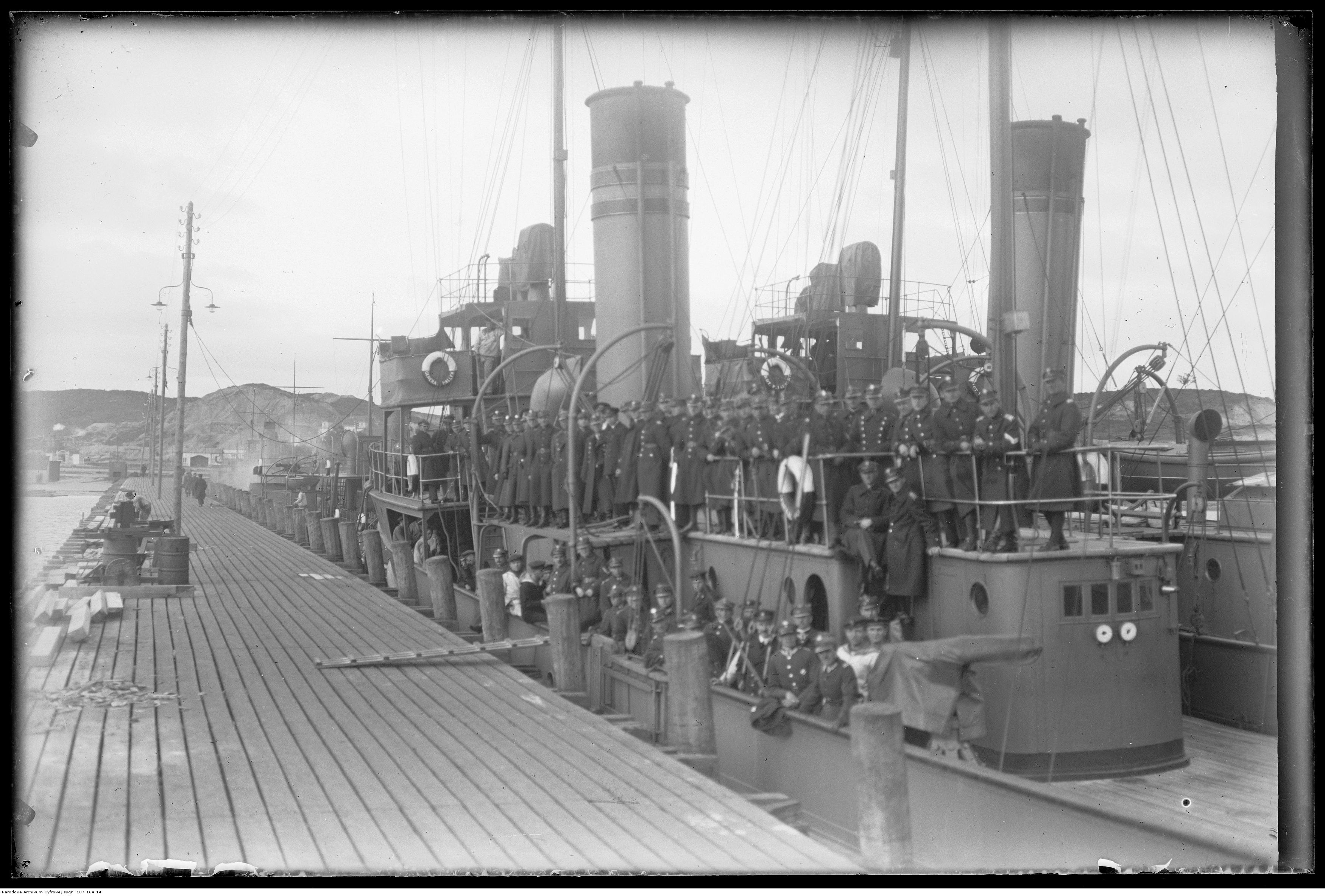 Uczestnicy wycieczki na kanonierce ORP Generał Haller.